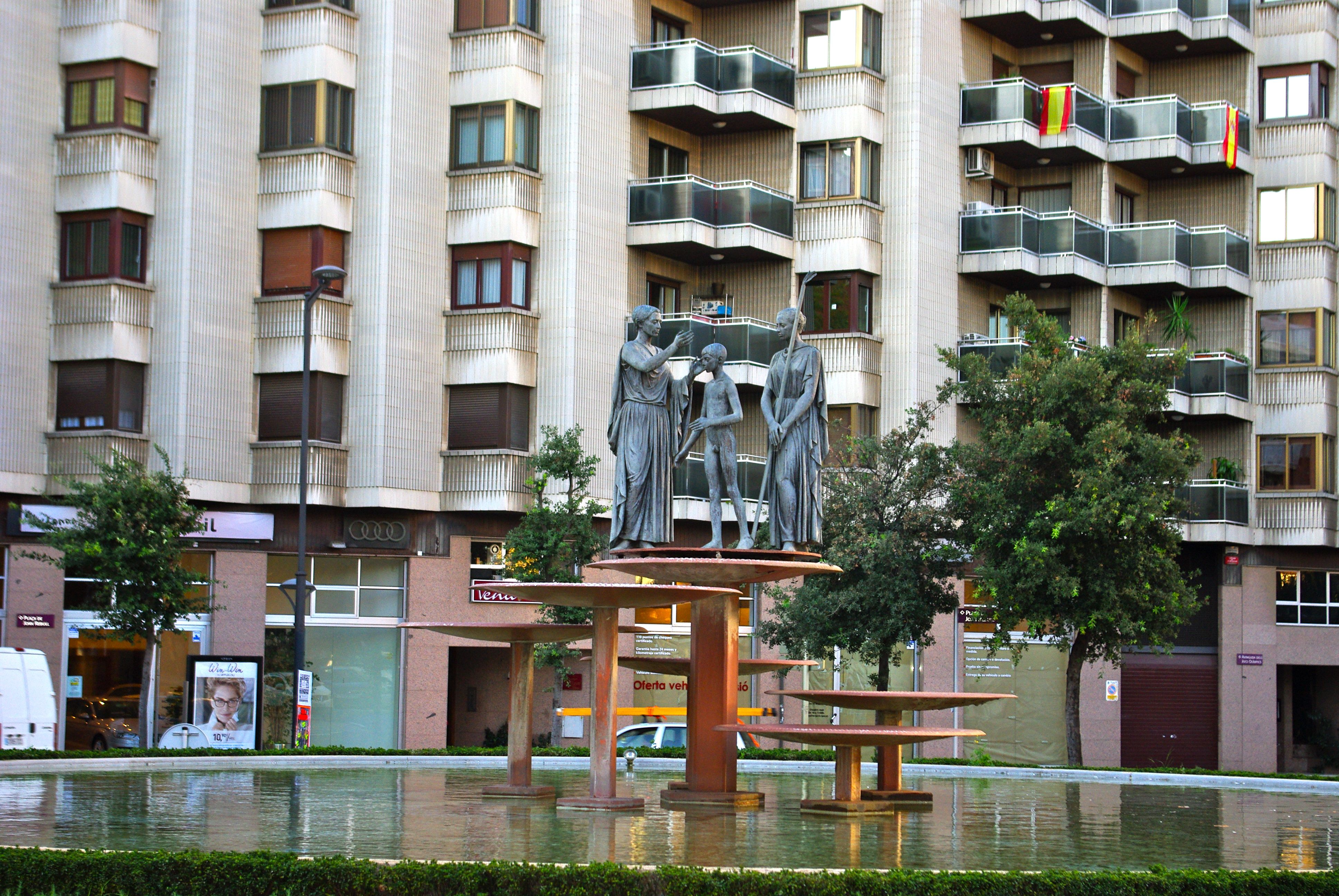 Escultura de Joan Rebull: el Triptòlem, a Reus